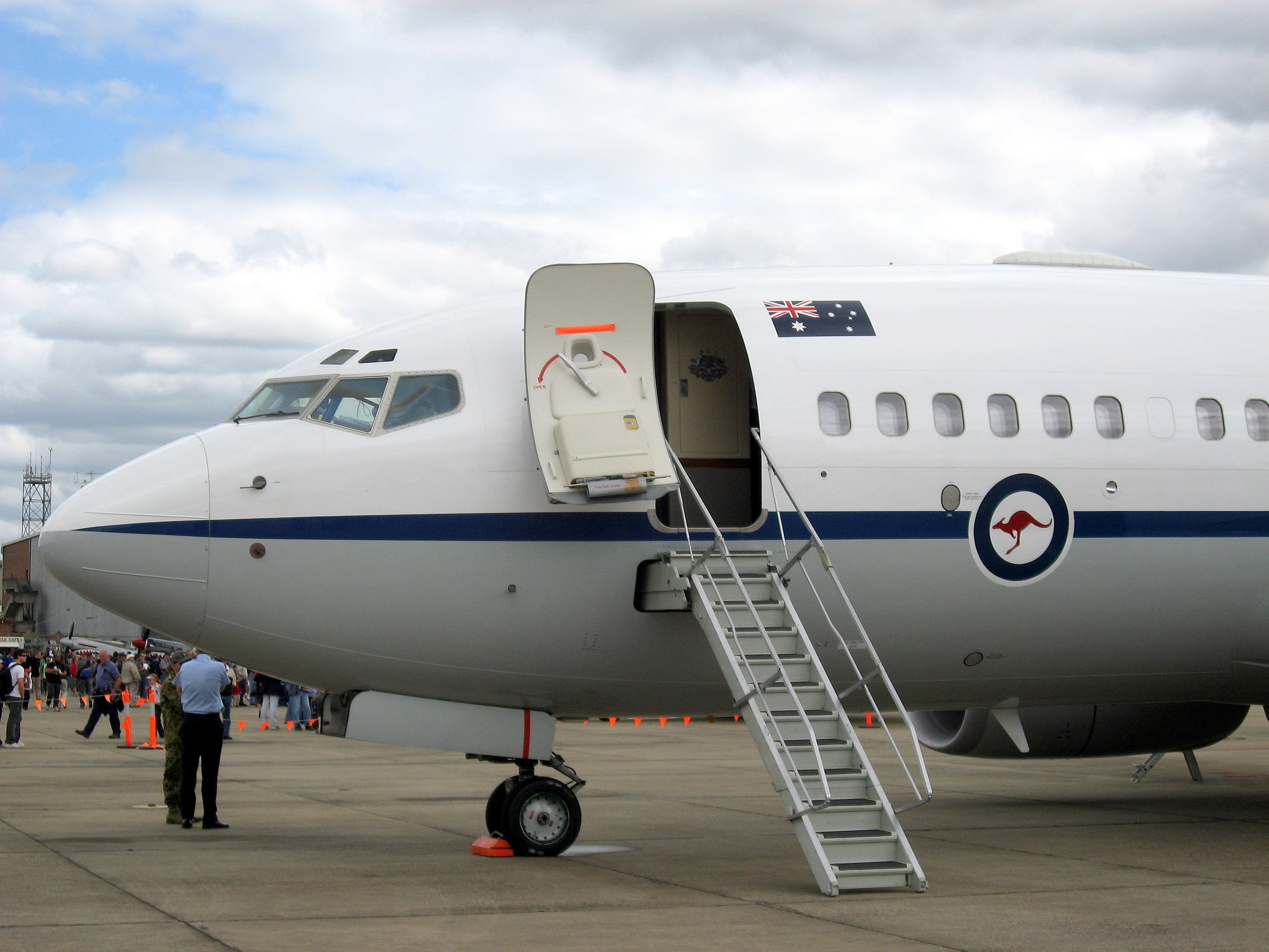 RAAF Boeing 737 BBJ (Boeing Business Jet)